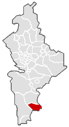 Ubicación geográfica del municipio de General Zaragoza en el estado mexicano de Nuevo León.